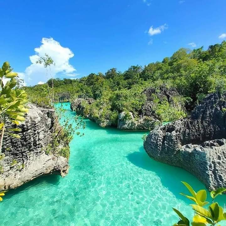 Teluk Toran Fakfak Papua barat